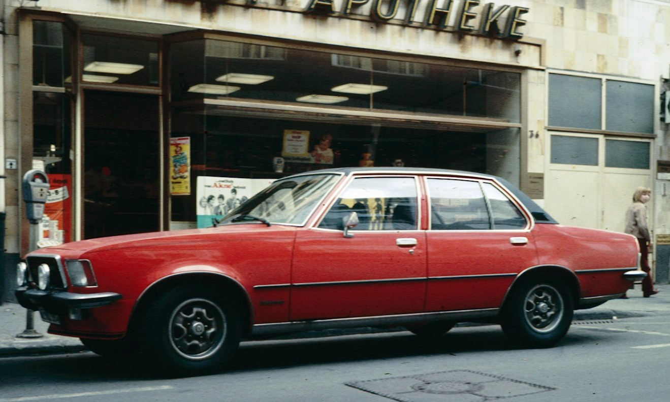 Opel Commodore B outside a pharmacy